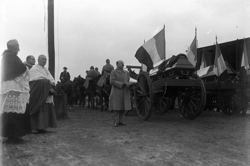 Zu den Ereignissen in Buer (Ruhrgebiet.) General Degoutte, Oberbefehlshaber im Ruhrgebiet hält an den Särgen eine Rede.